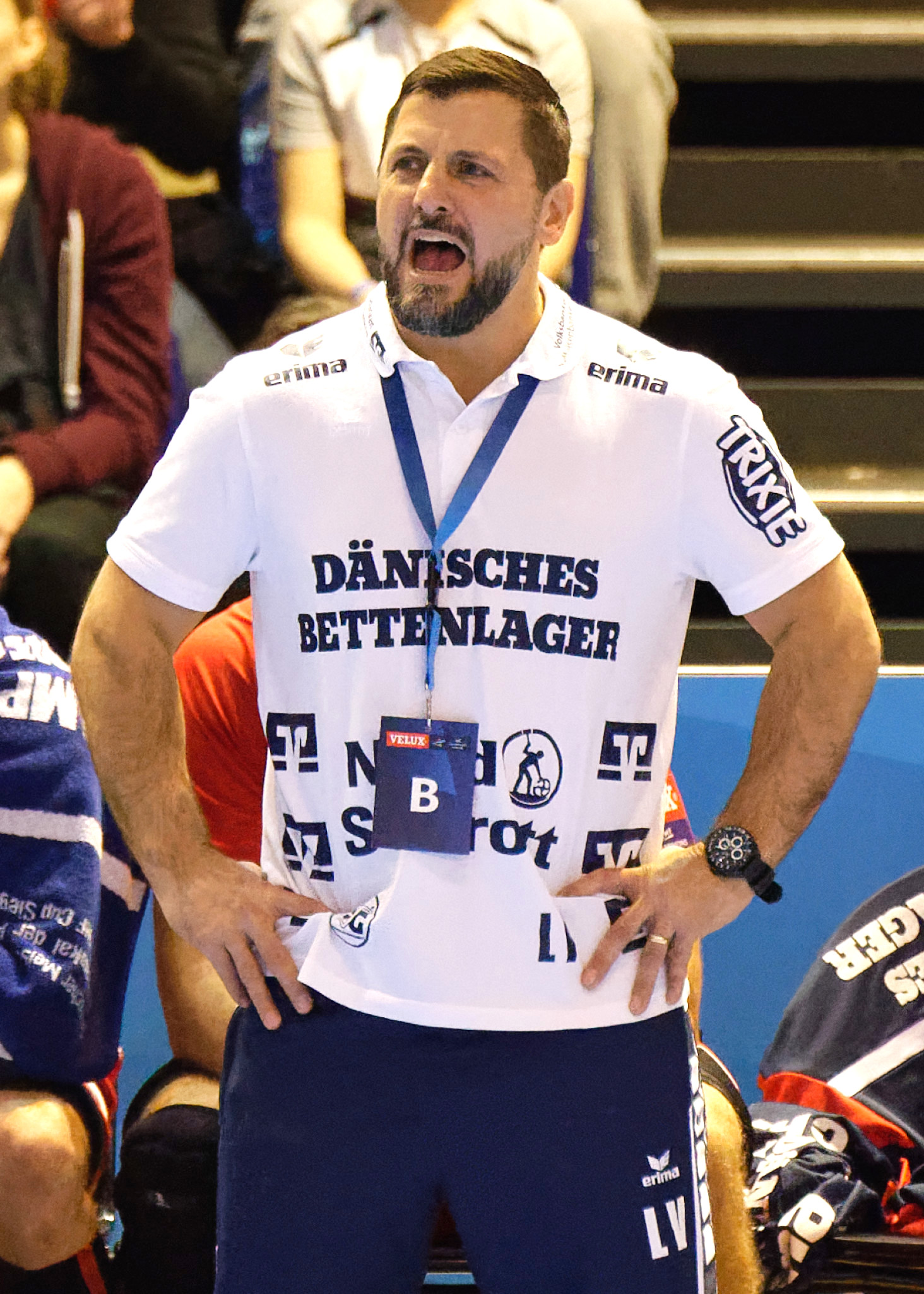 Rencontre de phase de groupe de la Ligue des Champions 2015-16 entre le PSG et SG Flensburg. A la Halle Carpentier (Paris), le 7 mars 2016.